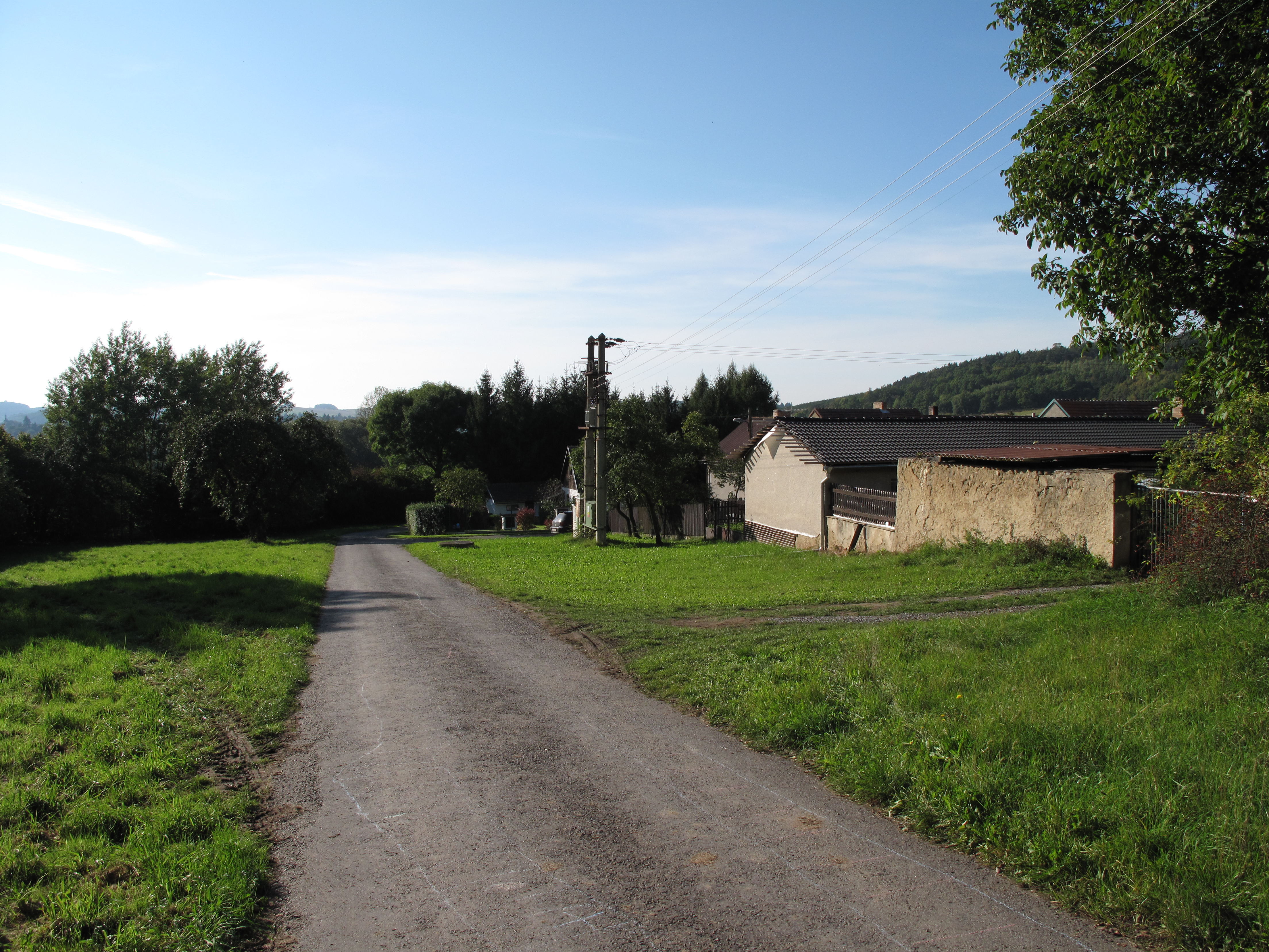 Silnice na návsi v Dubovce. Okres Benešov, Česká republika.